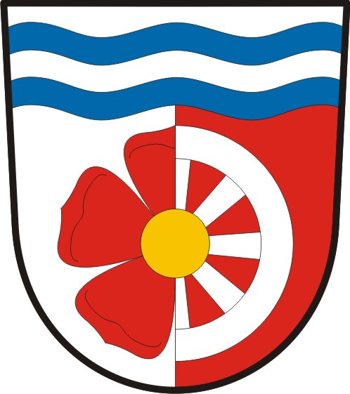 Doňov